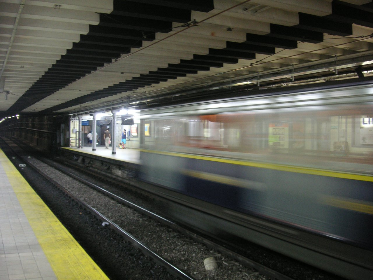 Estación Lima de la línea A de la red de subterráneos de la Ciudad de Buenos Aires